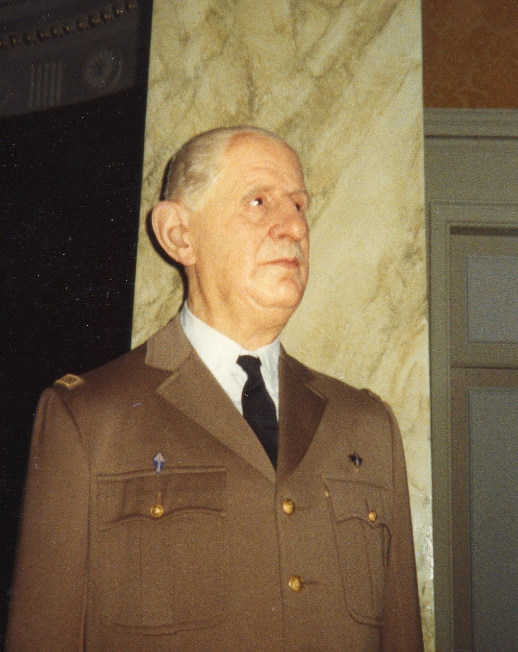 Statue de cire du général Charles De Gaulle au Musée Tussaud de Londres en 1992.